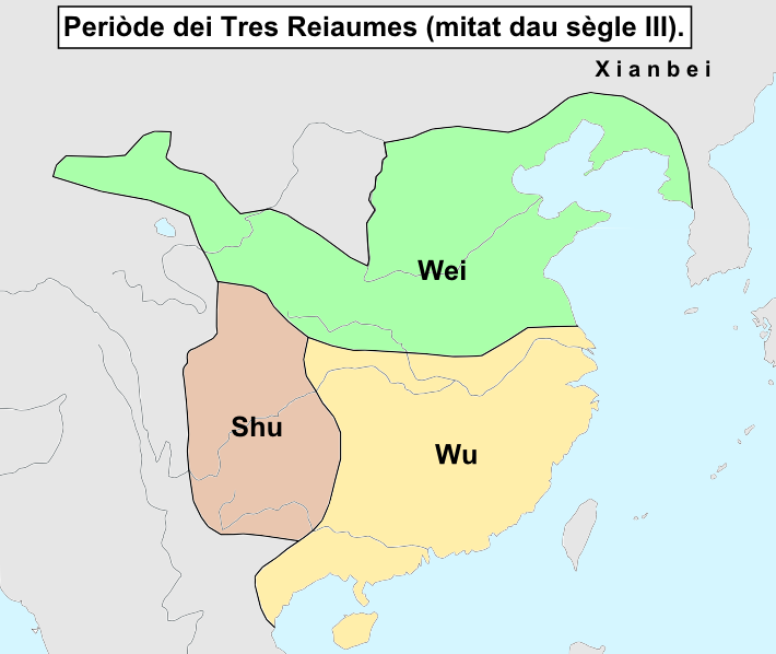 Division de China vèrs 250 durant lo Periòde dei Tres Reiaumes.